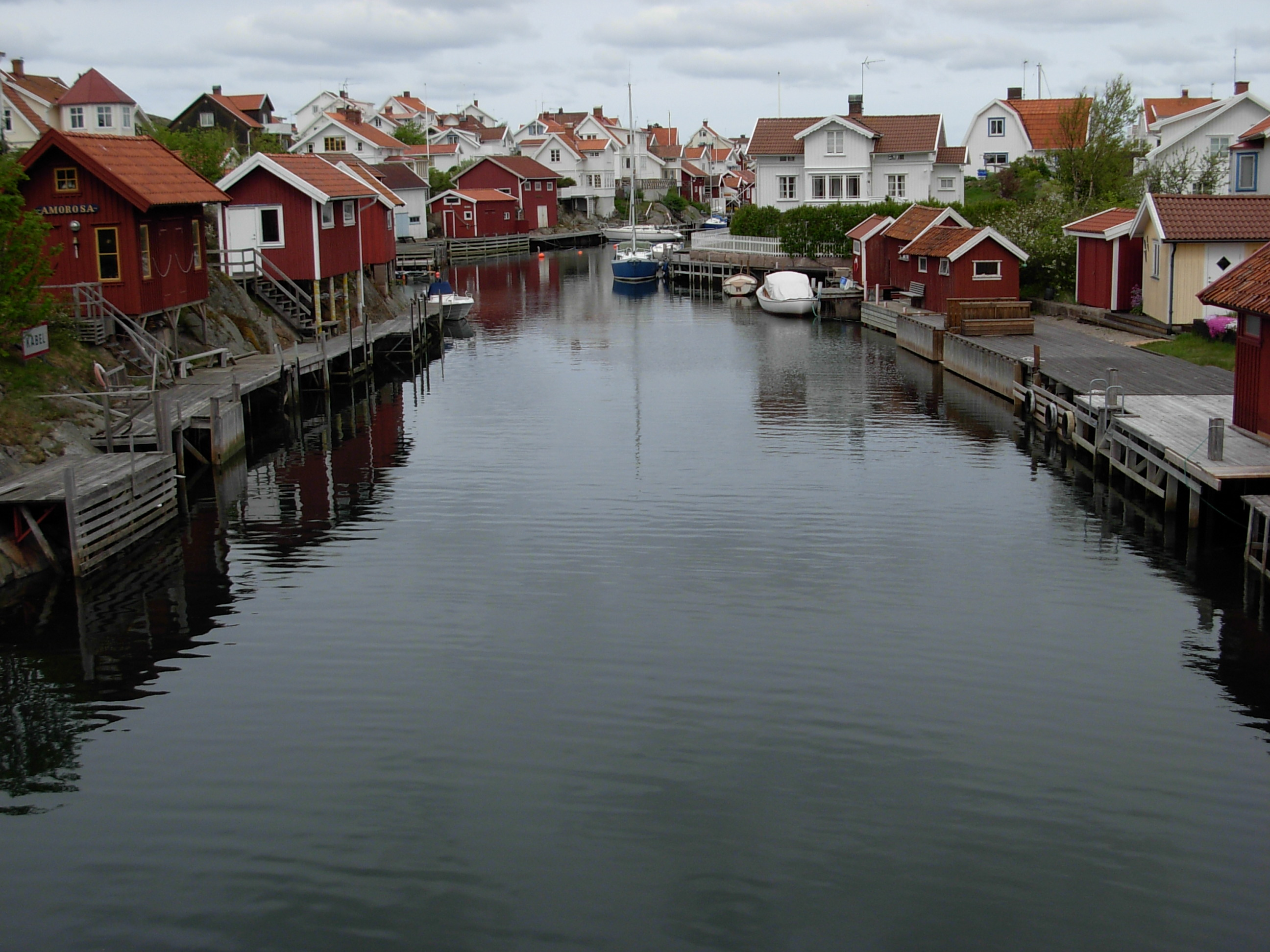 Bild från fiskeläget Grundsund i Bohuslän.